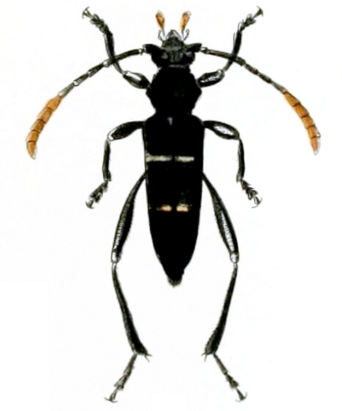 Asmedia mimetes mimetes (Cerambycinae)